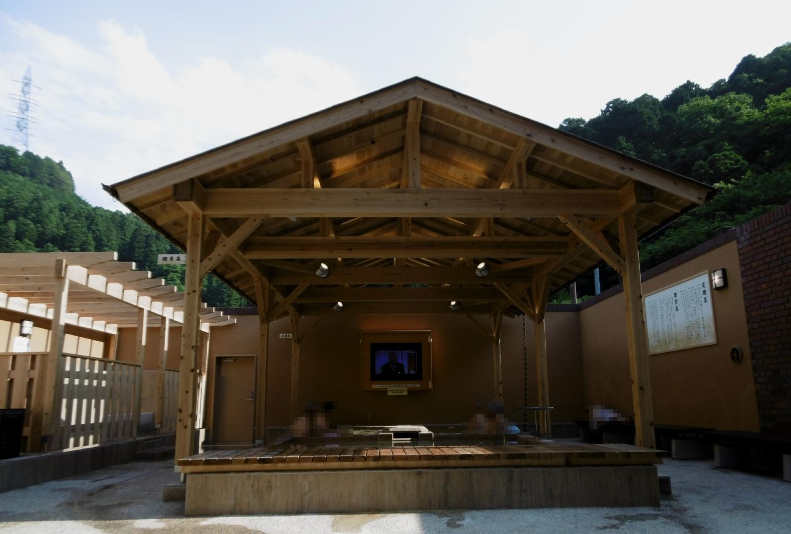 別子温泉の露天風呂